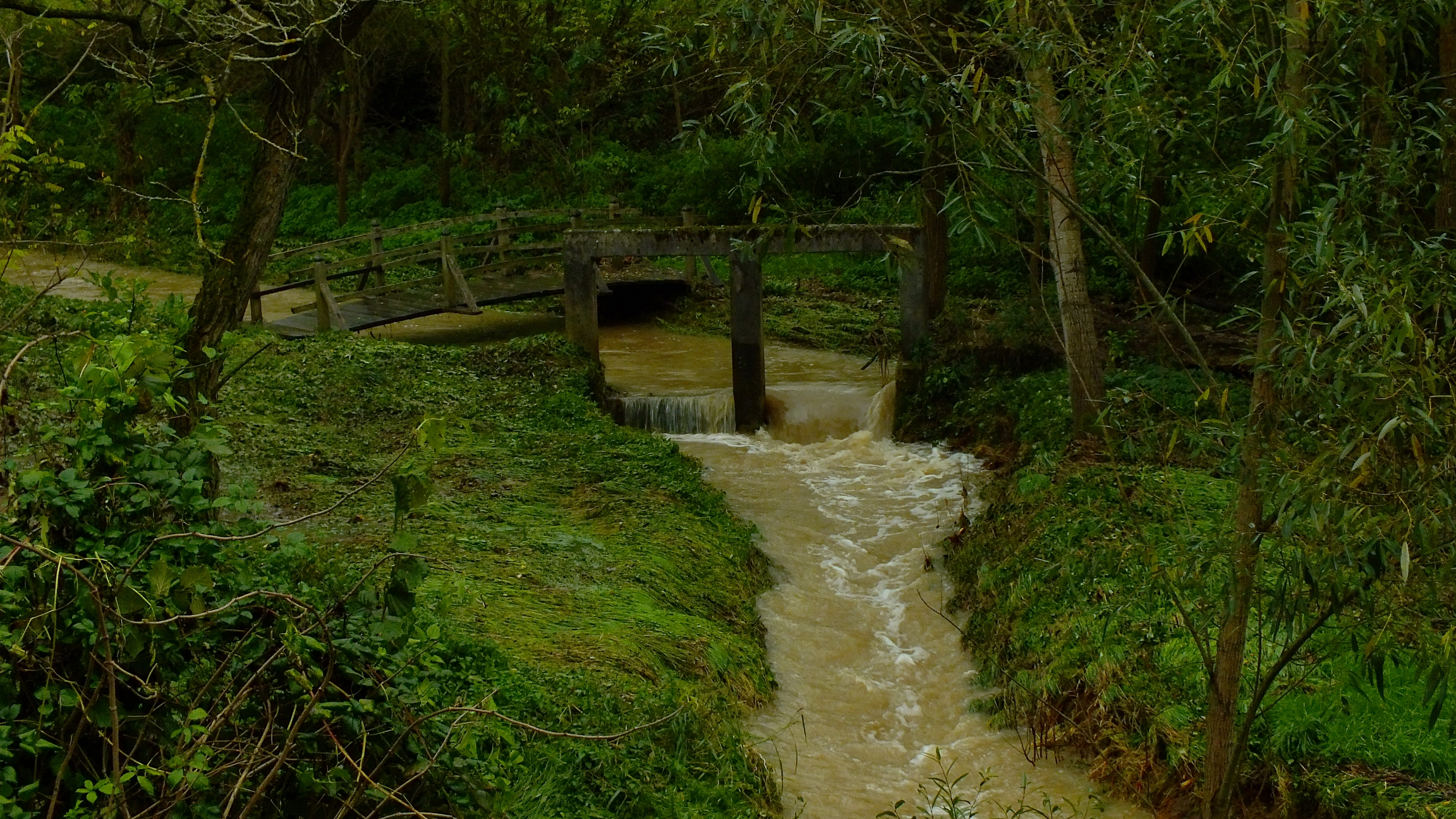 Eger-patak áradása belvízkor, Kapolcs 2014. október 23.